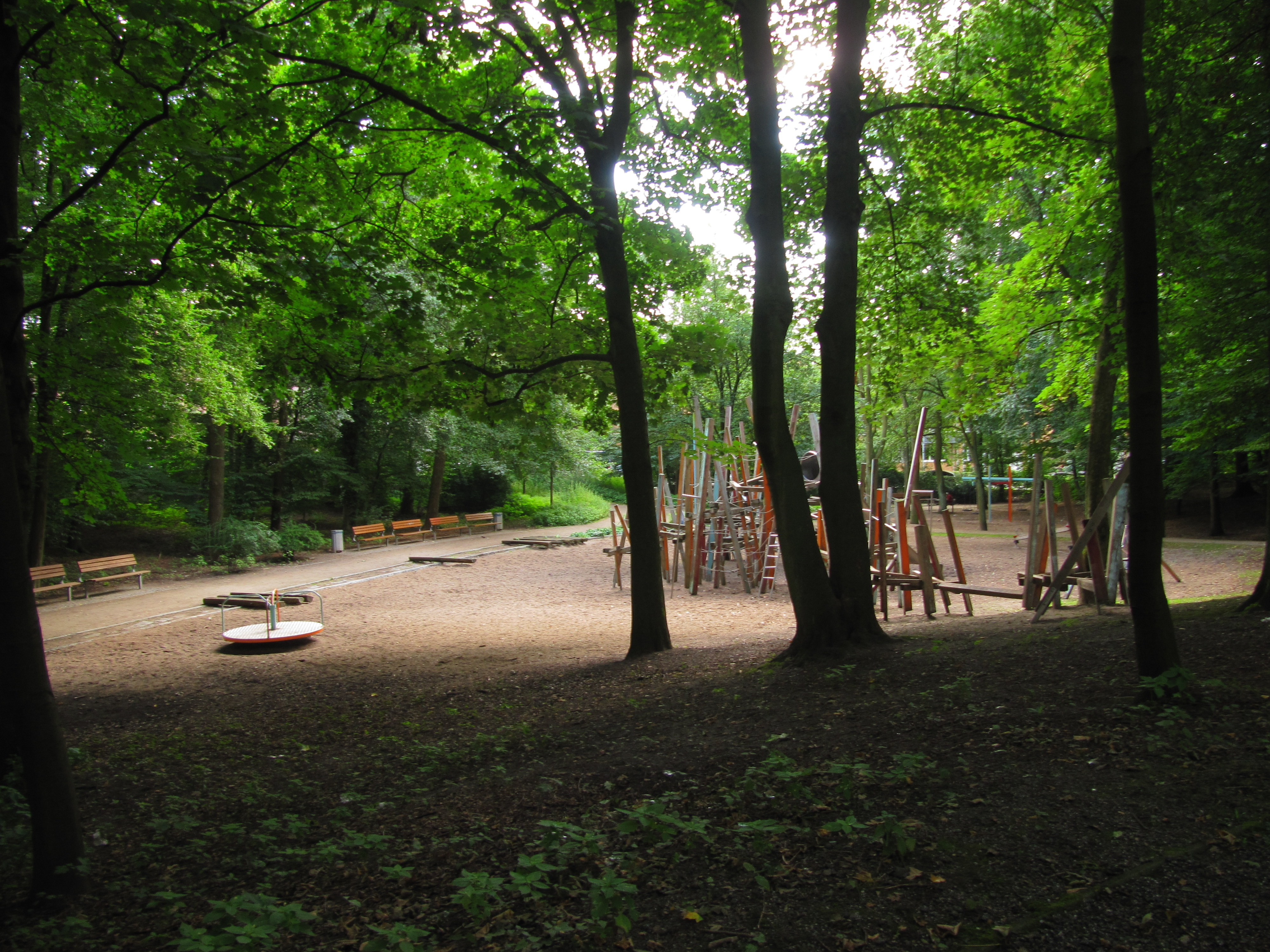 Blohms Park in Hamburg-Horn